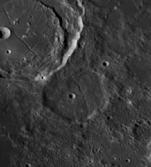 Cráter Chacornac LROC